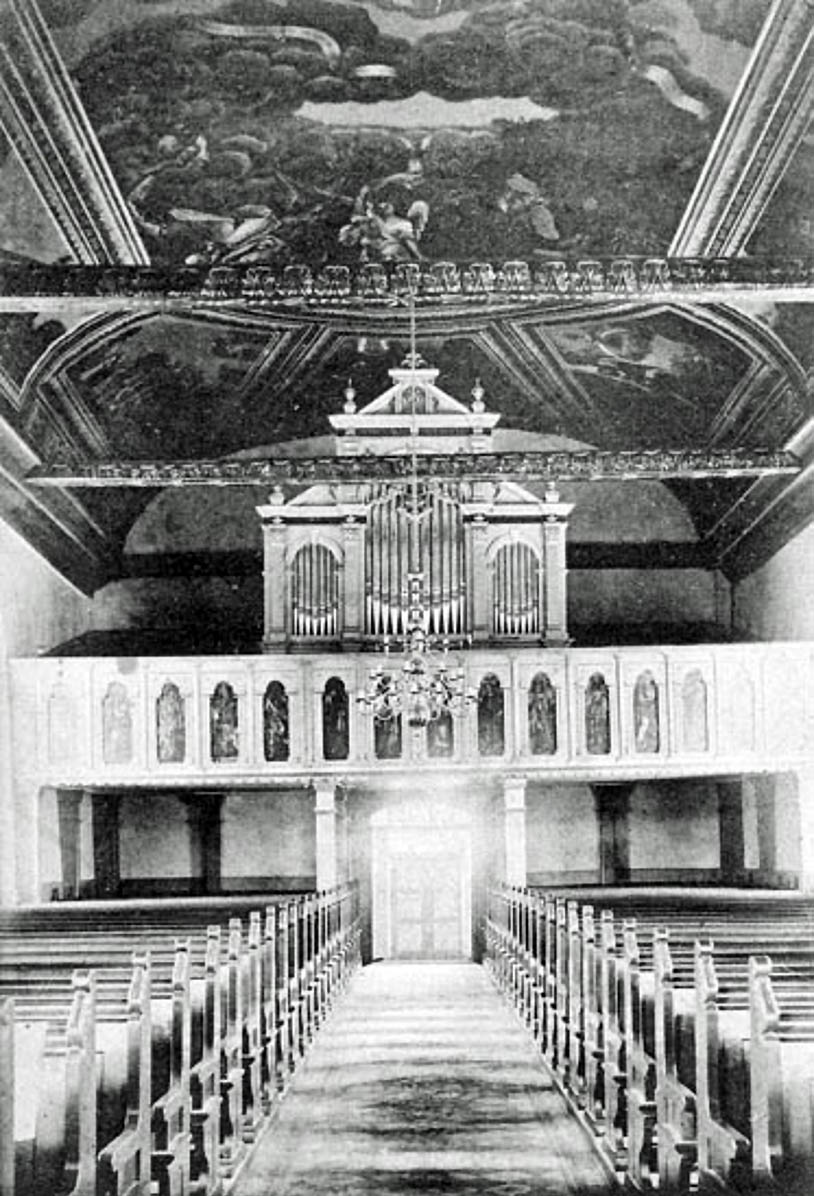 Svarteborgs kyrka. Interiör.